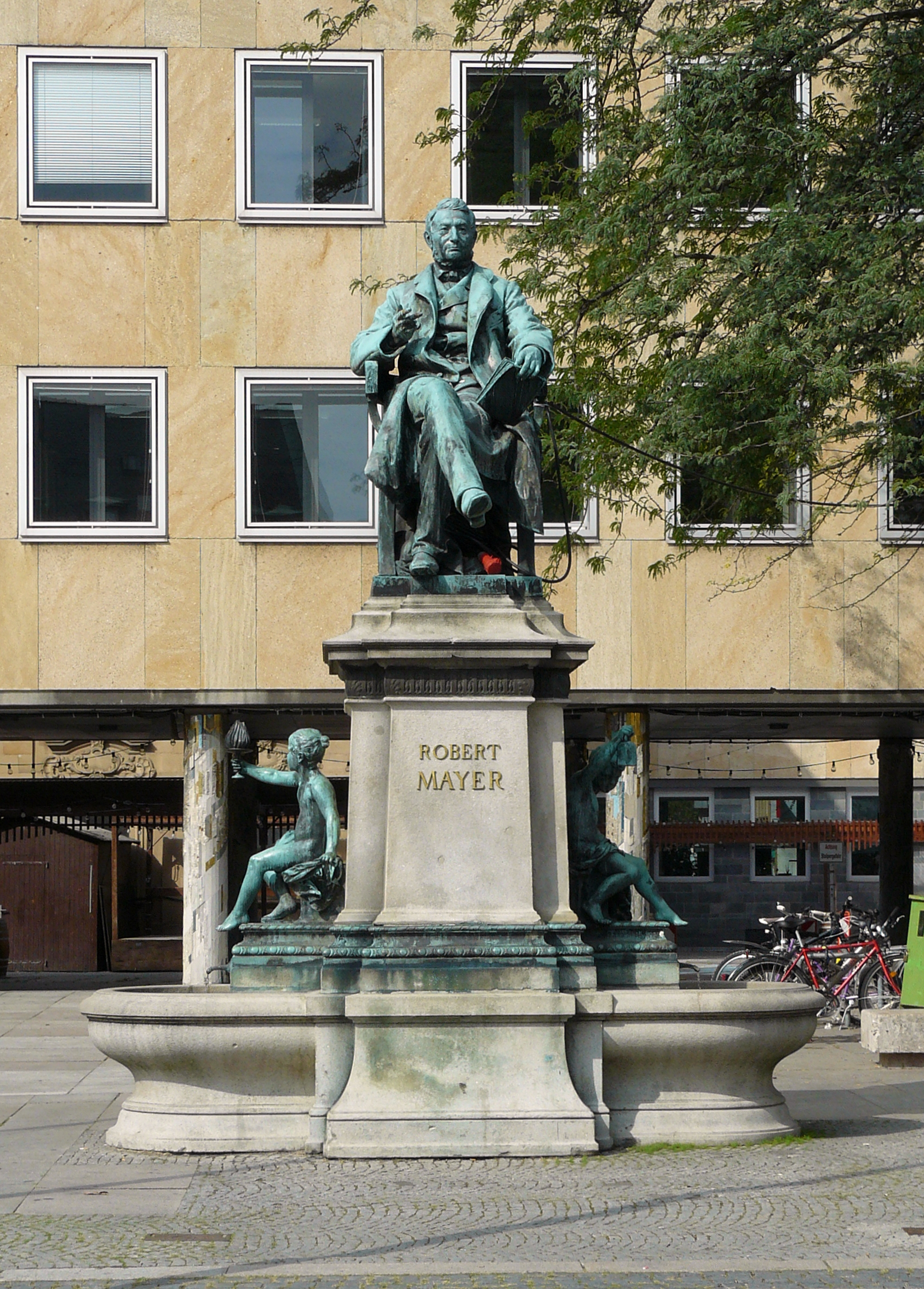 Denkmal für Robert Mayer in Heilbronn